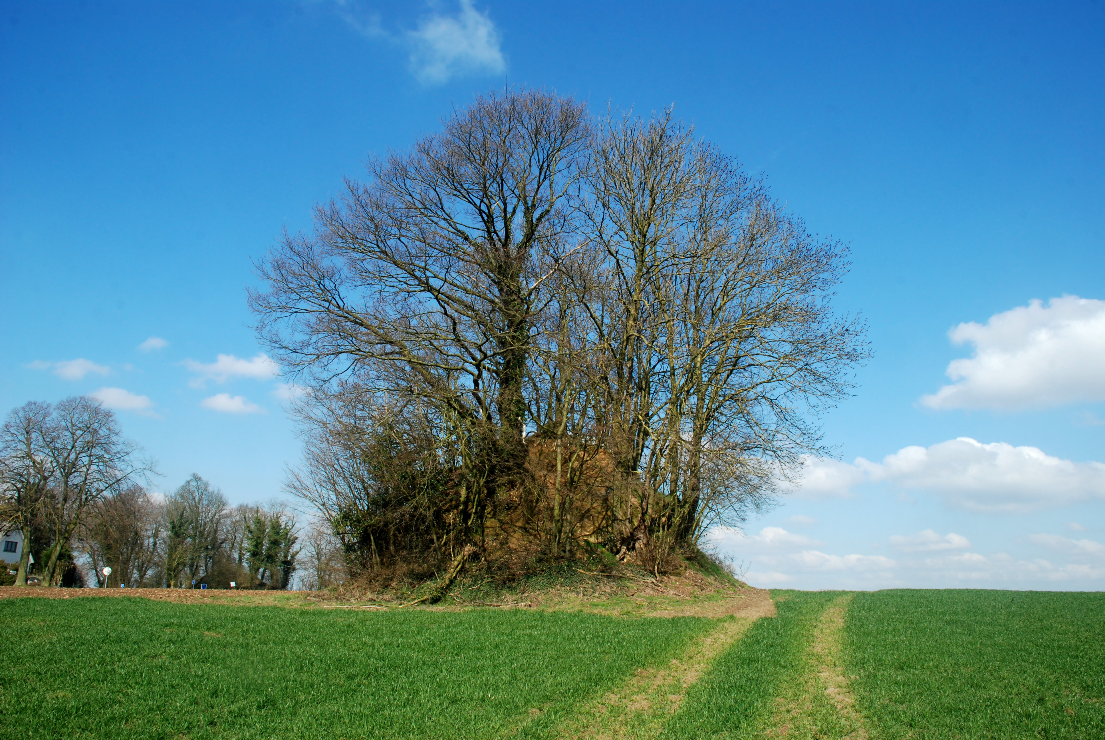 Belgique - Walhain - Tourinnes-Saint-Lambert - Tumuli de Libersart